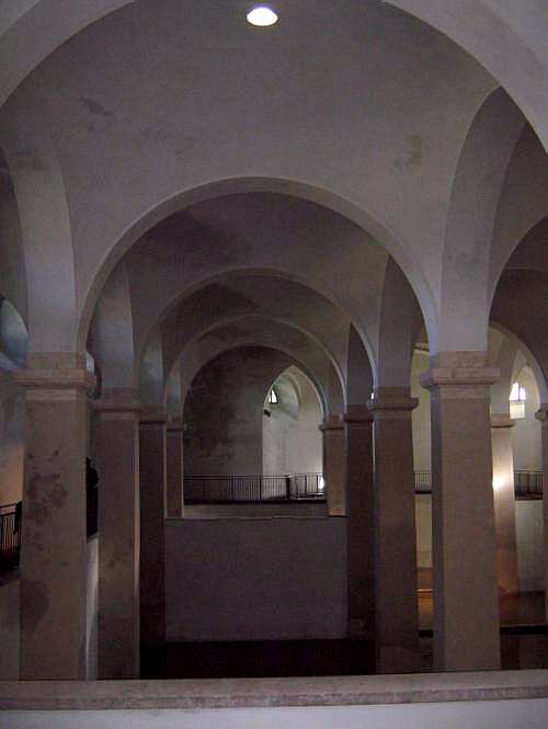 Livorno: il Cisternino di Pian di Rota (XIX secolo), progettato da Pasquale Poccianti. Nella foto, l'interno della struttura il giorno della inaugurazione a seguito dell'ultimazione dei lavori di restauro. Per l'occasione la vasca è stata parzialmente riempita d'acqua per far comprendere il sistema di funzionamento del serbatoio.